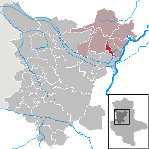 Zielitz in Saxony-Anhalt (Country) - District (Landkreis) Börde